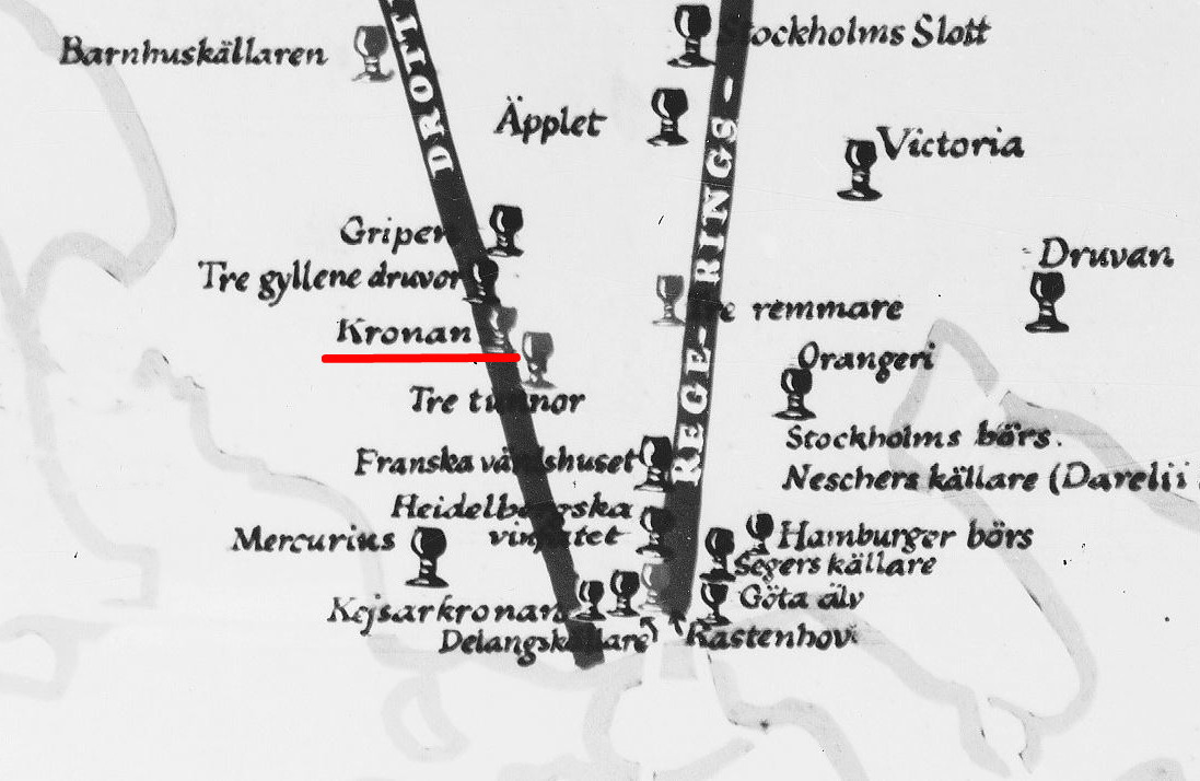 Värdshus i norra Stockholm, 1600-1700 (Källaren Kronan markerad med röd)